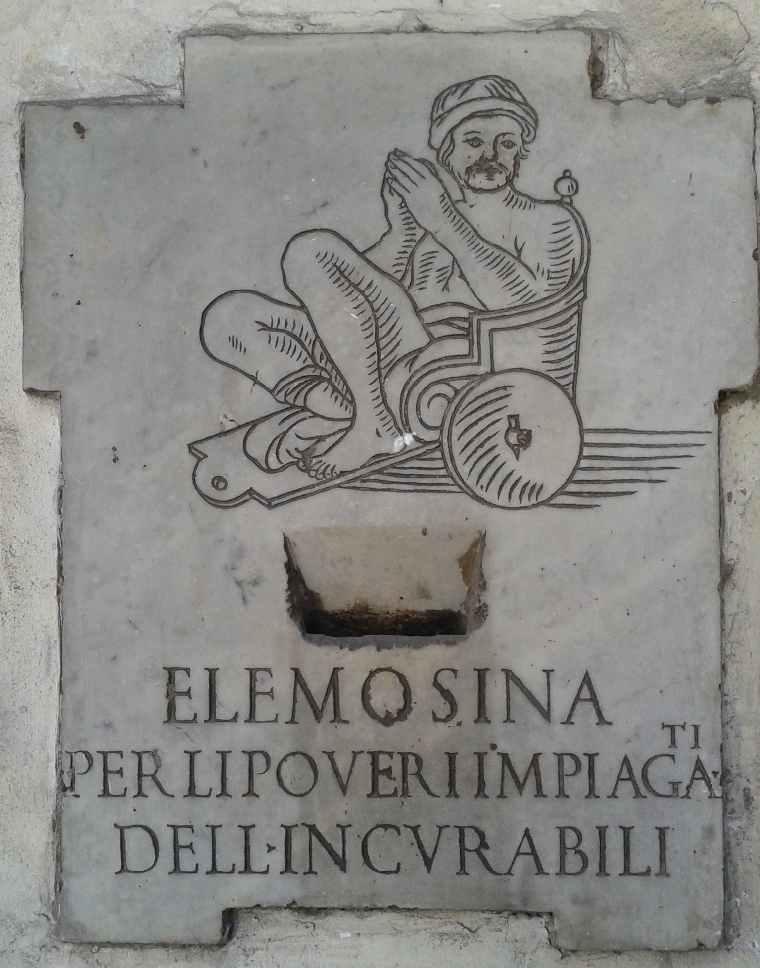 S.Maria Portae Paradisi